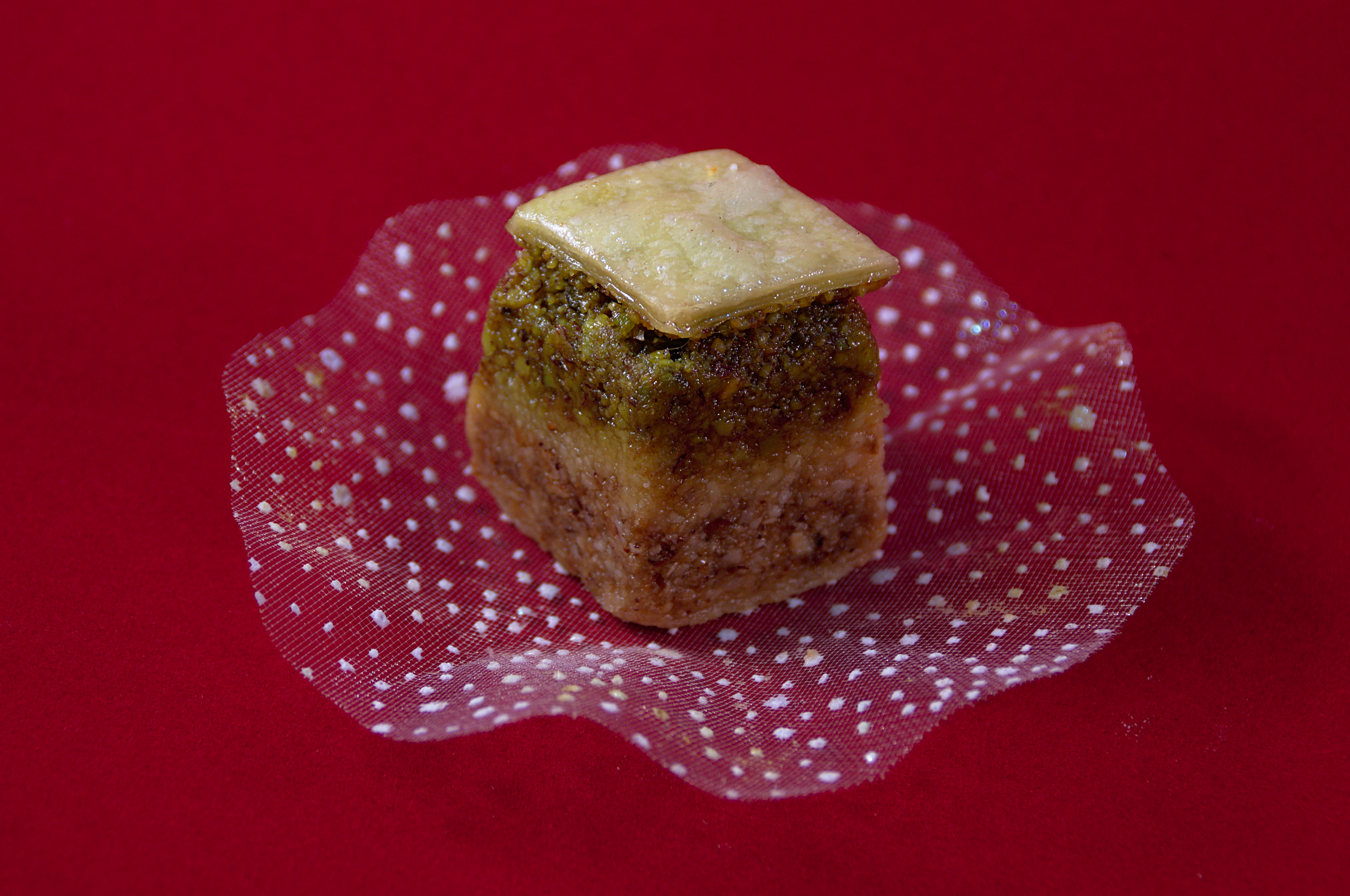 Pâtisseries tunisiennes traditionnelles.